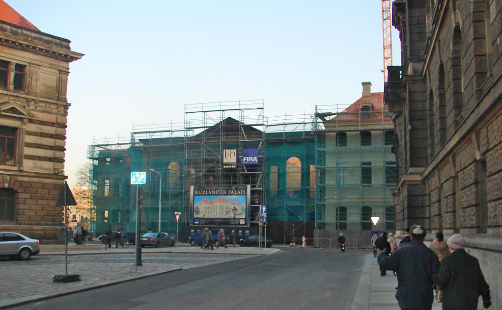 Sichtachse Rampische Straße - Kurländer Palais, Dresden